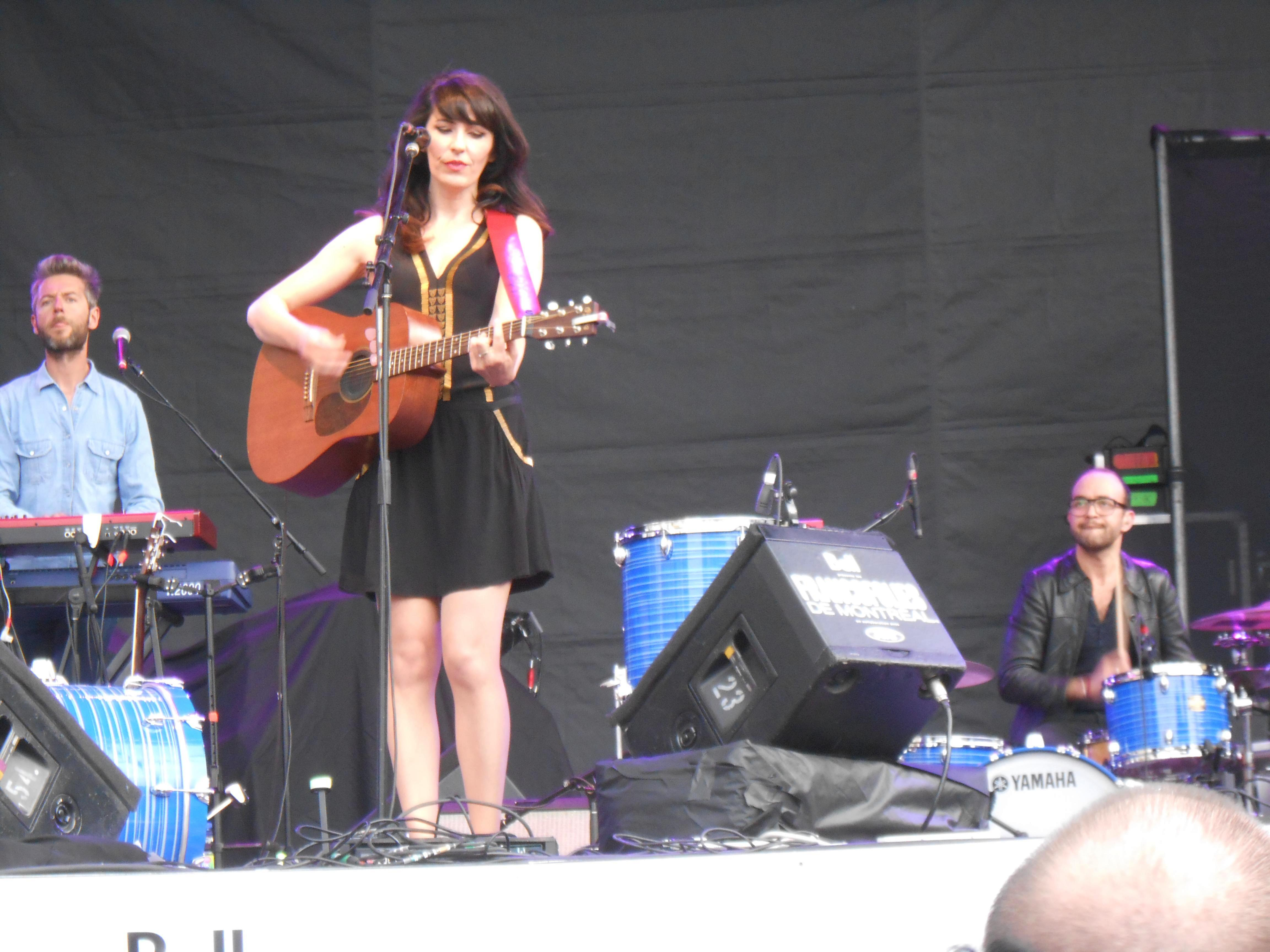 La Grande Sophie a offert une performance lors du spectacle d'ouverture des FrancoFolies de Montréal, le 13 juin 2013, sur la scène, rue Sainte-Catherine.